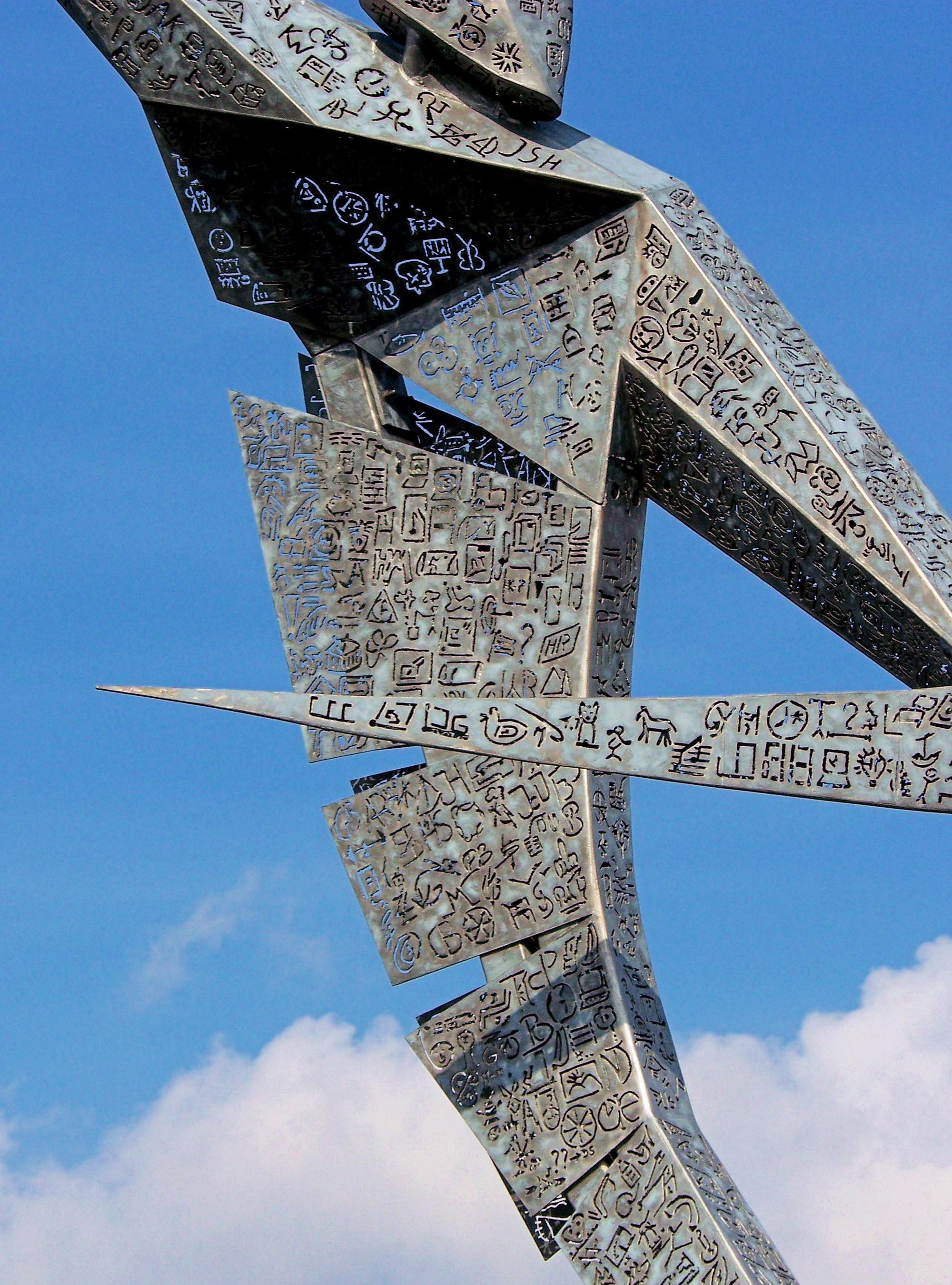 Fierljepper (1995) van Hans Mes, in Drachten.